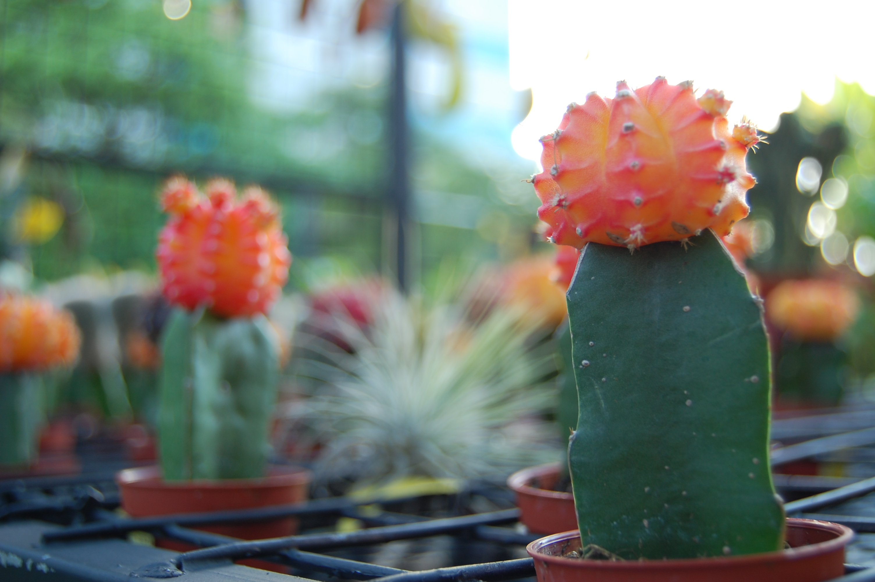 Hort Park